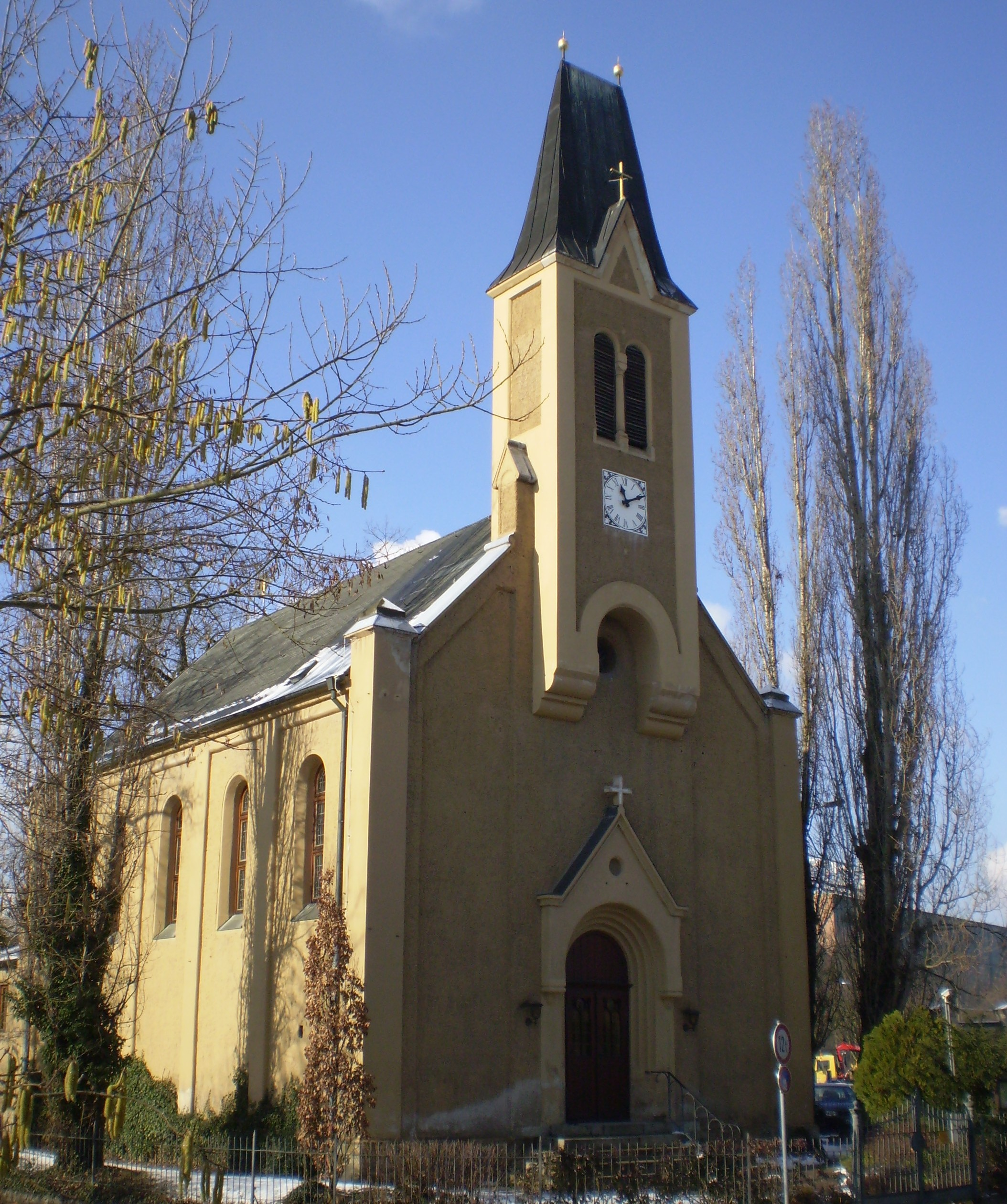 Gethsemanekirche der Evangelisch-Lutherischen Kirchgemeinde Leipzig-Connewitz-Lößnig